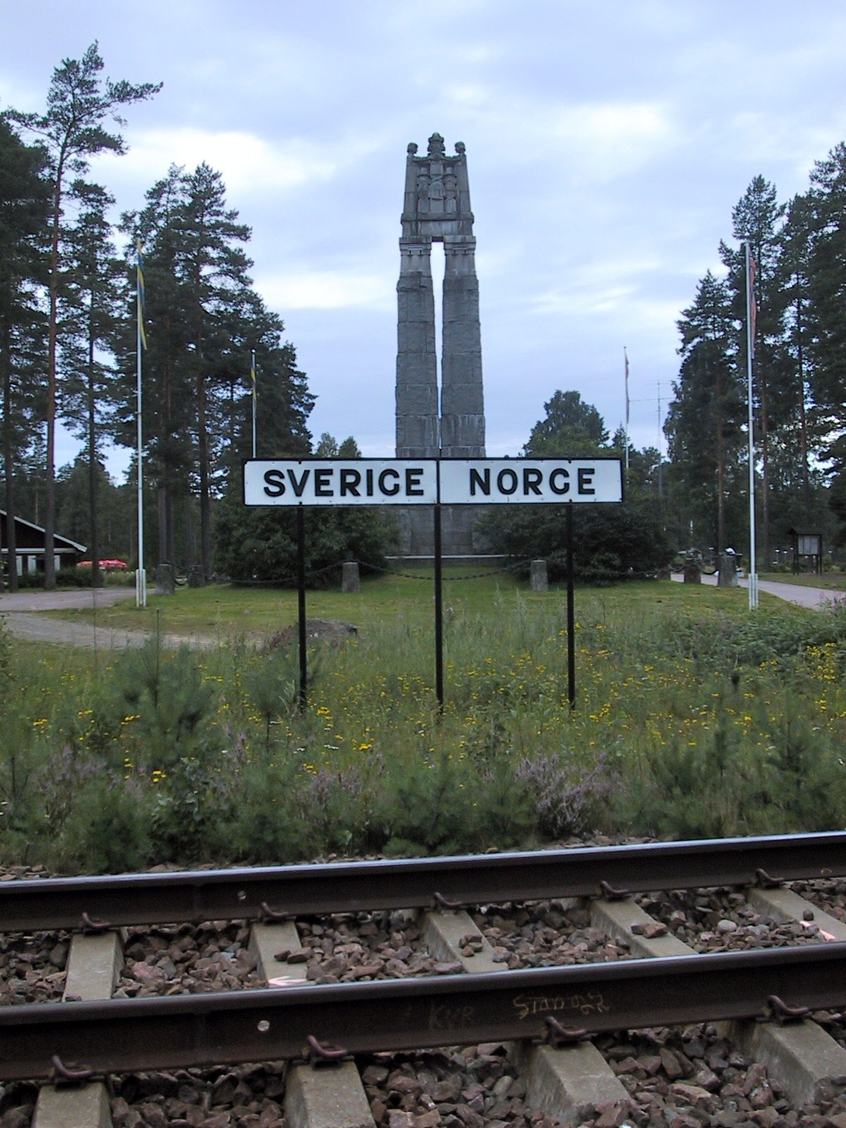 Fredsmonumentet vid Eda restes 1914 av fredsrörelserna i Norge och Sverige för att hedra minnet av den långa freden mellan länderna som inte ens brutit samman 1905. Samma vecka bröt första världskriget ut. Efter det har platsen haft olika betydelser, bland annat som den fria republiken Morokulien under Lennart Hylands besyddarskap. Se Aronsson, P. (2005) '1905 - unionsupplösning att glömma eller att stoltsera med?', in Nilsson, T. and Sørensen, Ø., (red.) Goda grannar eller morska motståndare? Sverige och Norge från 1814 till idag, 216-248. Stockholm: Carlsson.